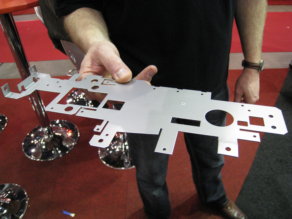 Voorbeeld van een plaatstalen product gemaakt op een moderne ponsnibbelmachine (bron: Metaal Magazine)